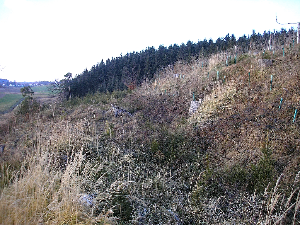 Frühmittelalterlicher Ringwall bei Mittelstetten (Landkreis Fürstenfeldbruck, Oberbayern). Die Westseite mit dem Hanggraben. Eigene Aufnahme, Dez. 2007 / Early Middle Ages ringwork castle near Mittelstetten (Landkreis Fuerstenfeldbruck, Upper Bavaria, Germany). Western part, looking into the moat. Own photo, Dec. 2007